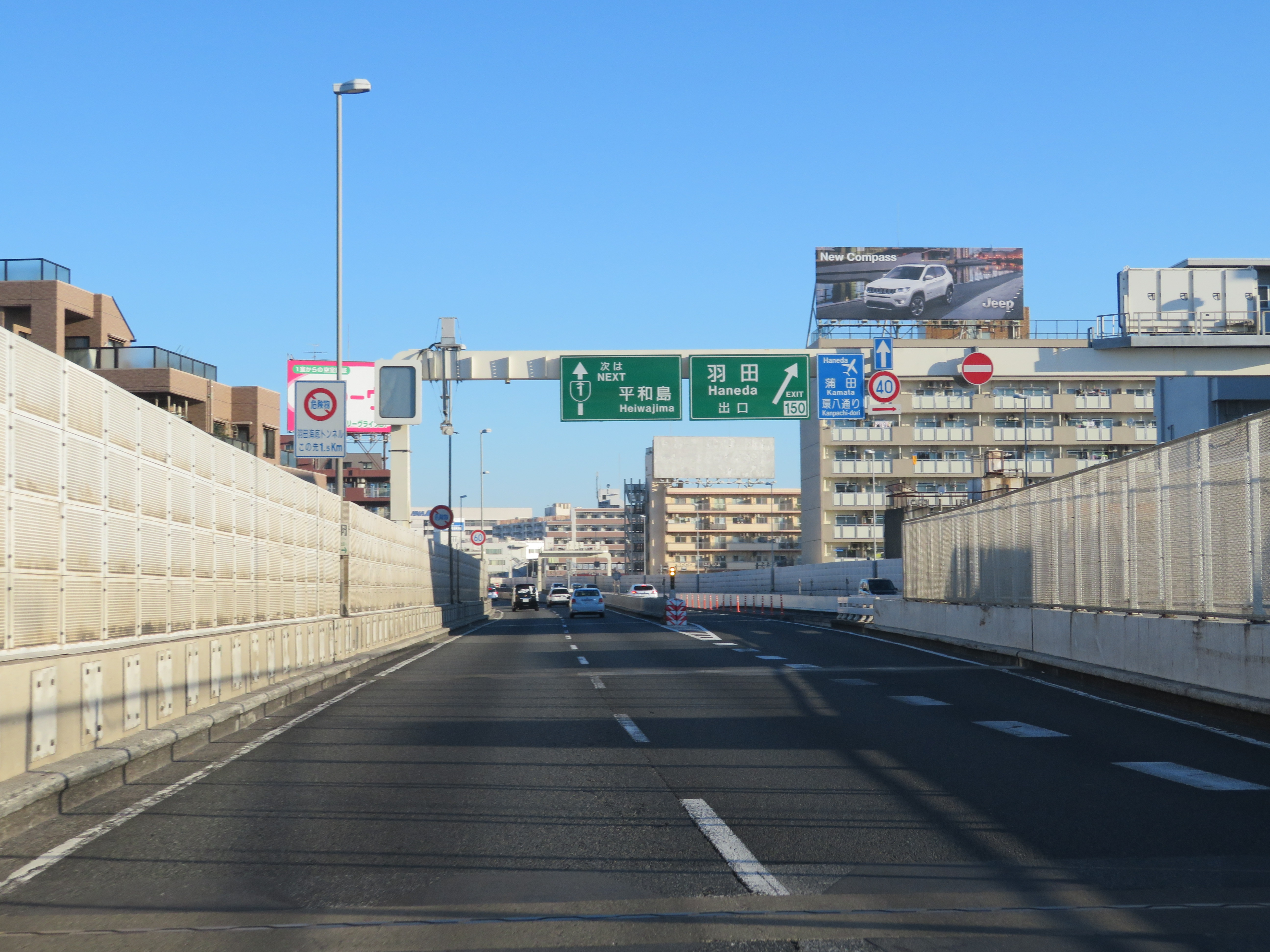 首都高速道路神奈川1号横羽線羽田出入口（上り出口付近）